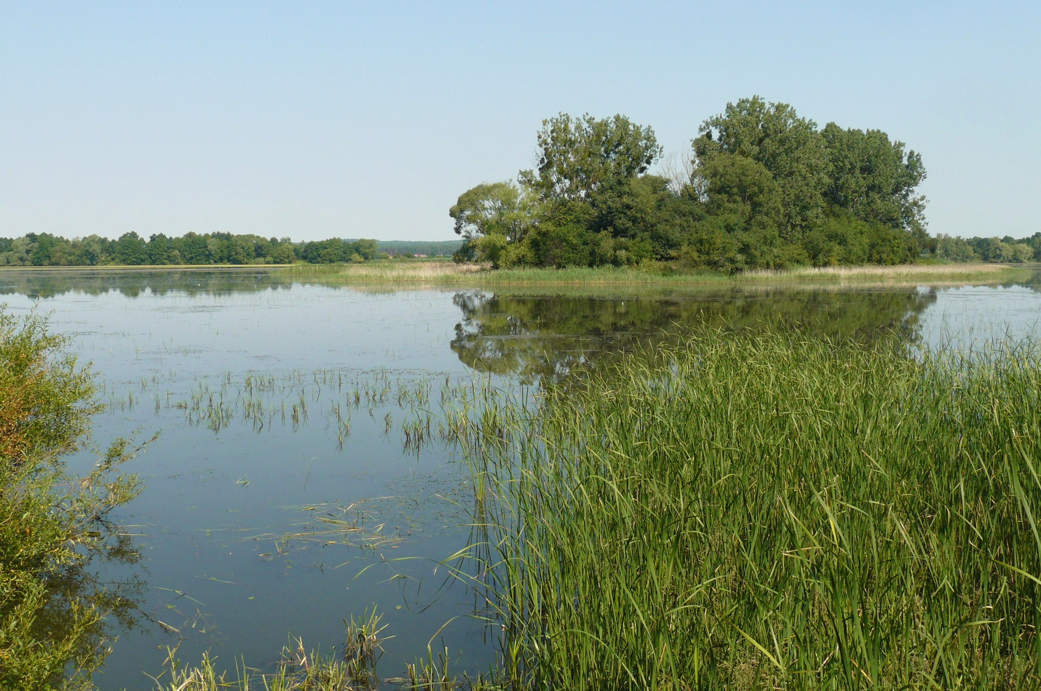 Stawy Milickie, kompleks Stawno - staw Słupicki Stary zwany Dużym i jego okolice.